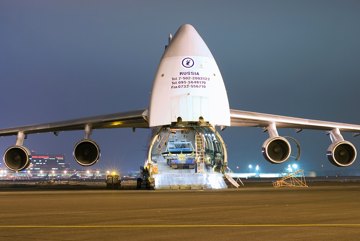 "Ruslan" An-124